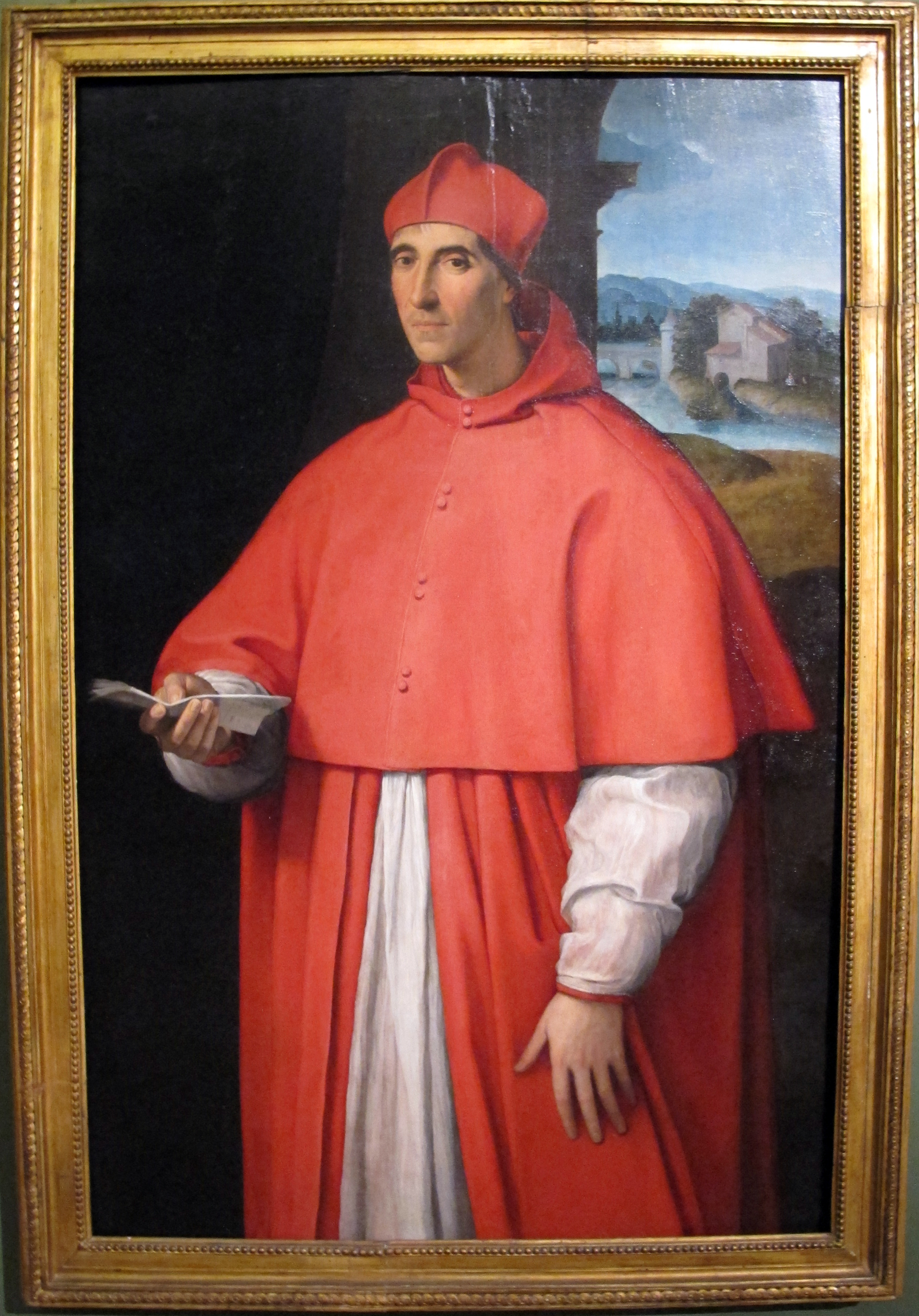 Ritratto del cardinale Alessandro Farnese, futuro papa Paolo IIIPotrait of Cardinal Alessandro Farnesetitle QS:P1476,it:"Ritratto del cardinale Alessandro Farnese, futuro papa Paolo III" label QS:Lit,"Ritratto del cardinale Alessandro Farnese, futuro papa Paolo III" label QS:Len,"Potrait of Cardinal Alessandro Farnese"